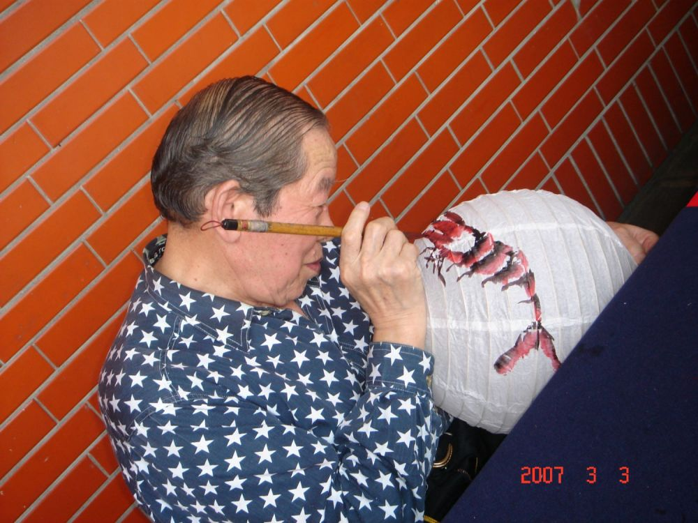 中文（台灣）: 畫燈籠的老師傅